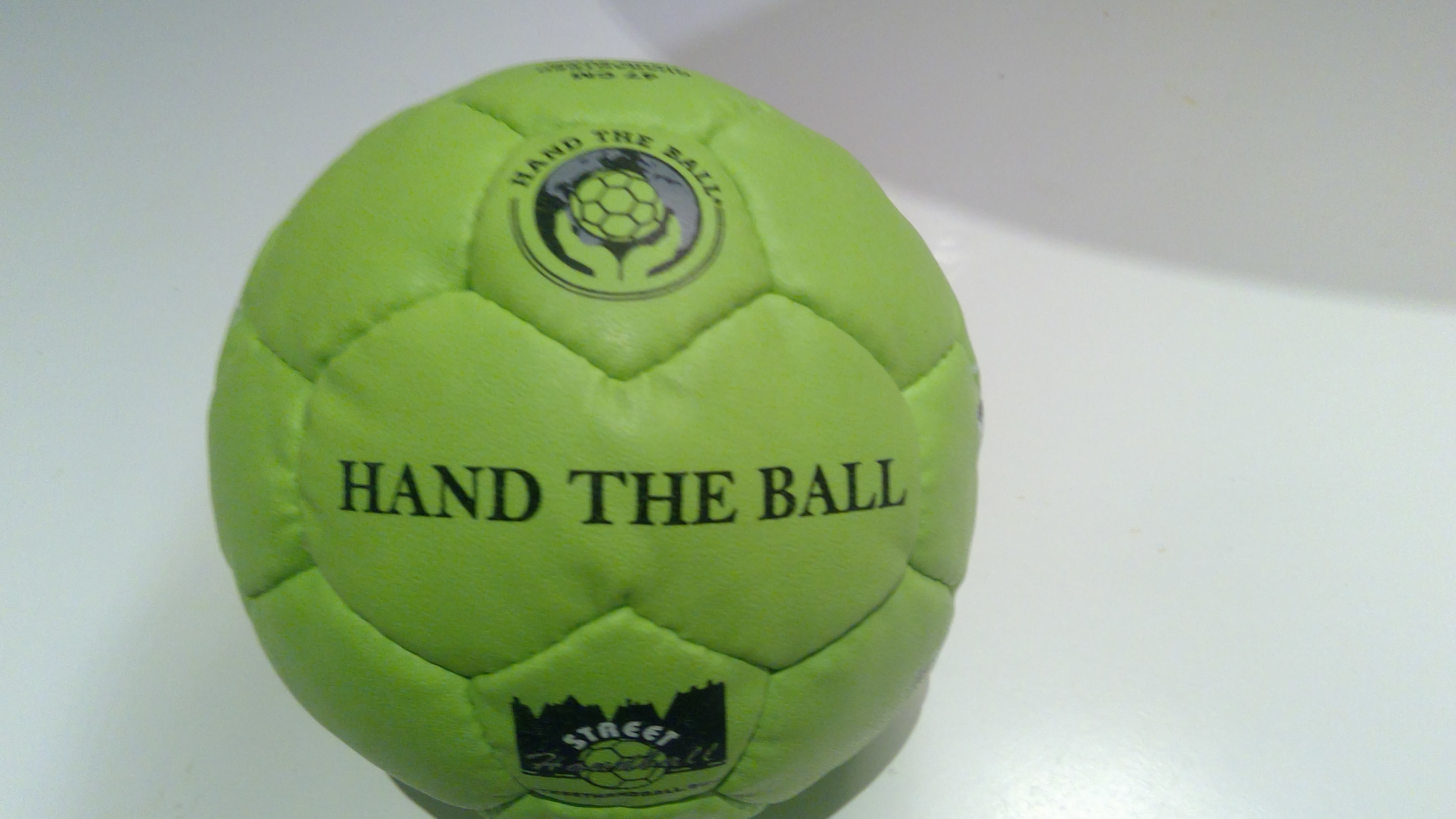 Fondens bold